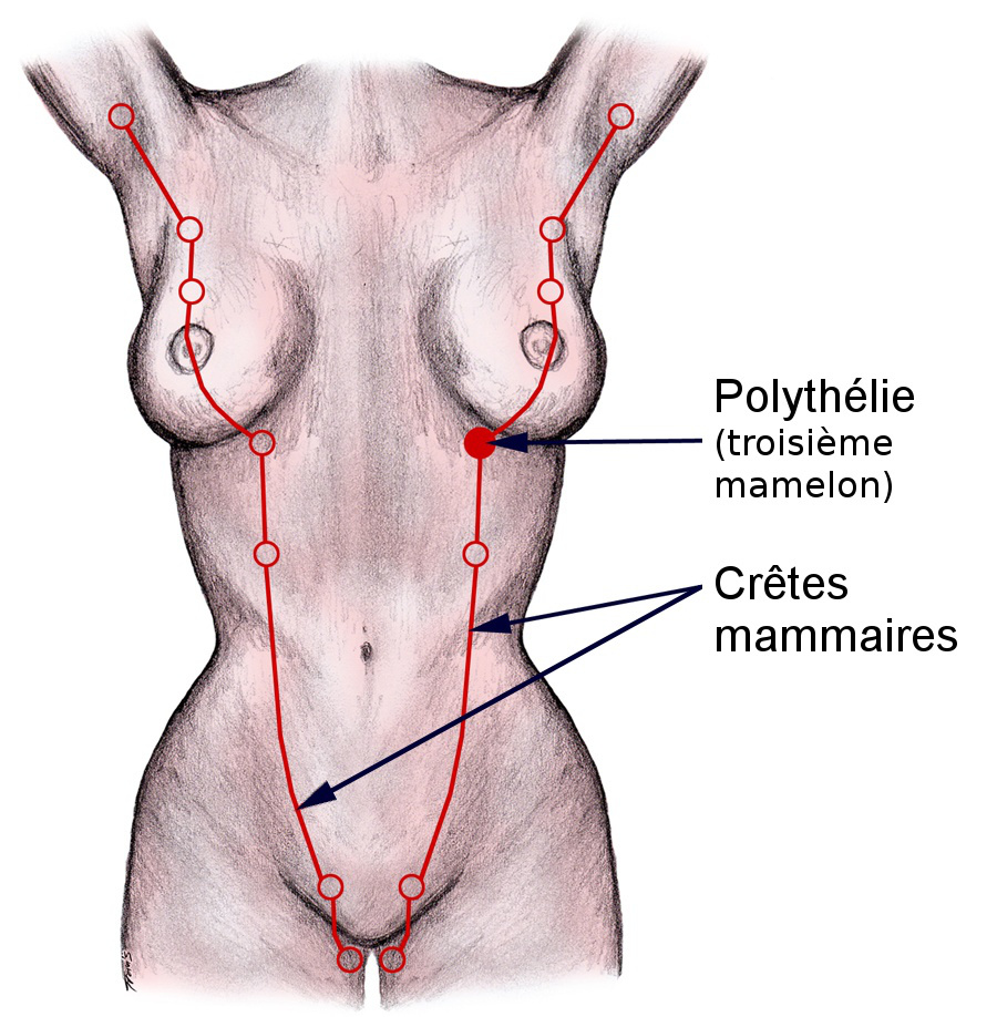 Représentation du yissu mammaire surnuméraire.